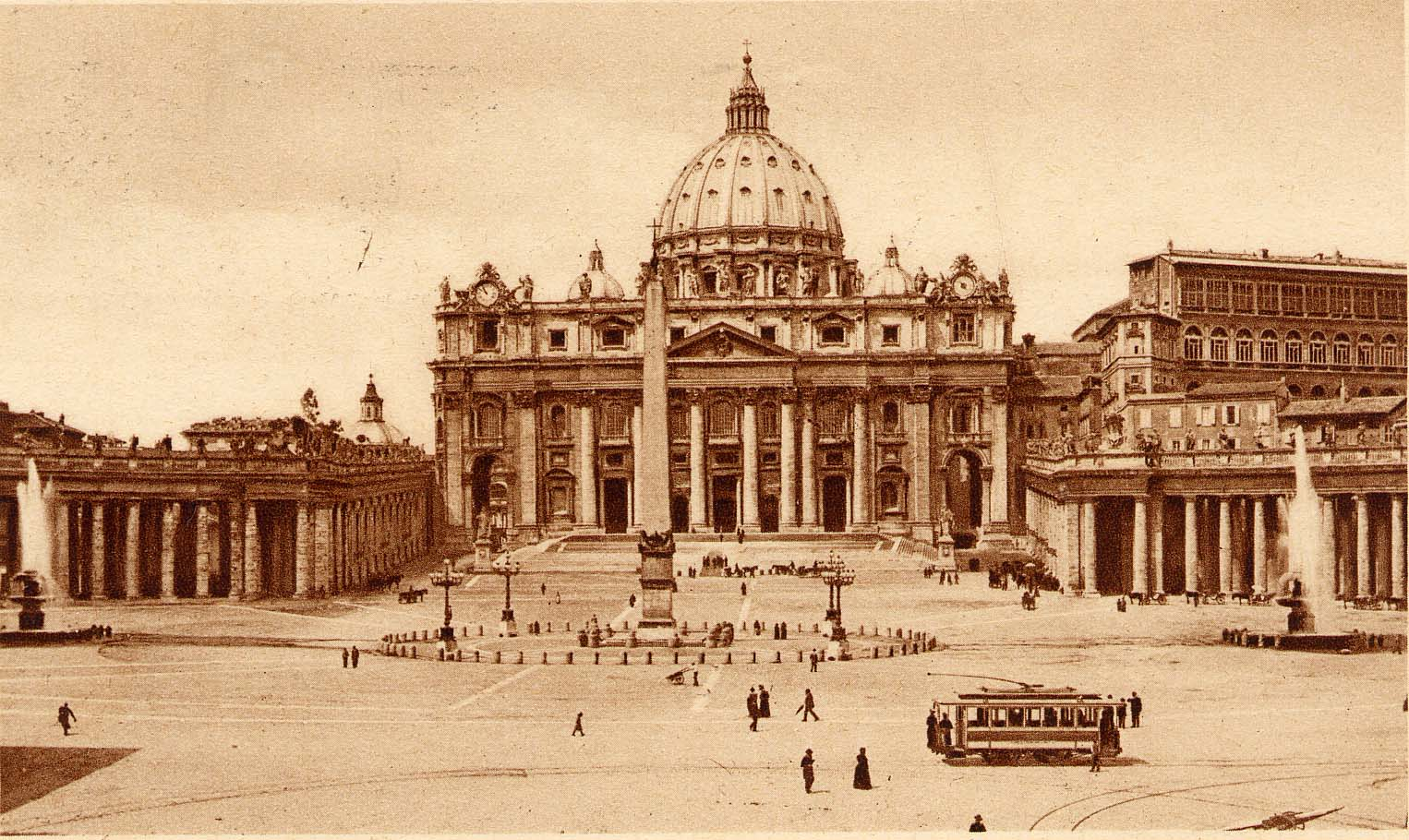 tram srto